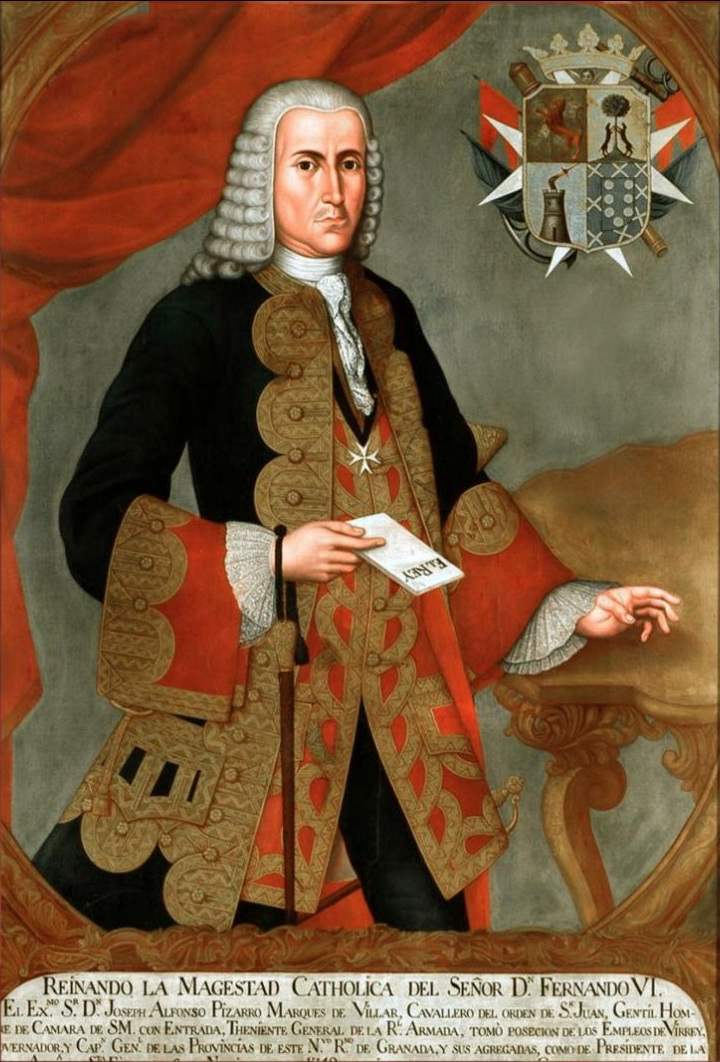 Portrait of José Alfonso Pizarro (1689-1762)